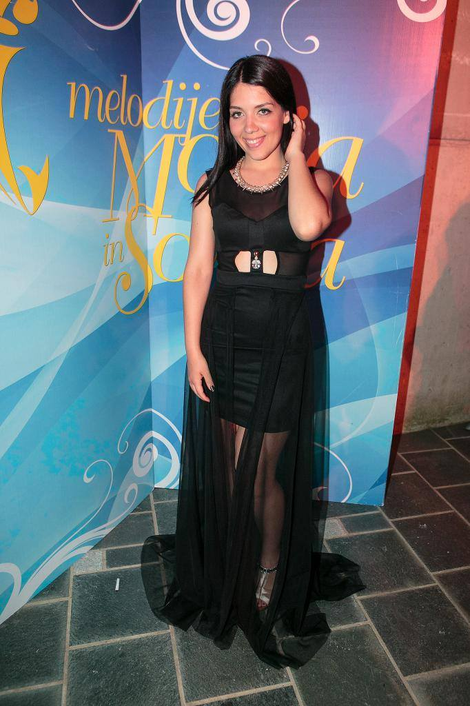 Ina Shai at the Melodije Sonca Festival